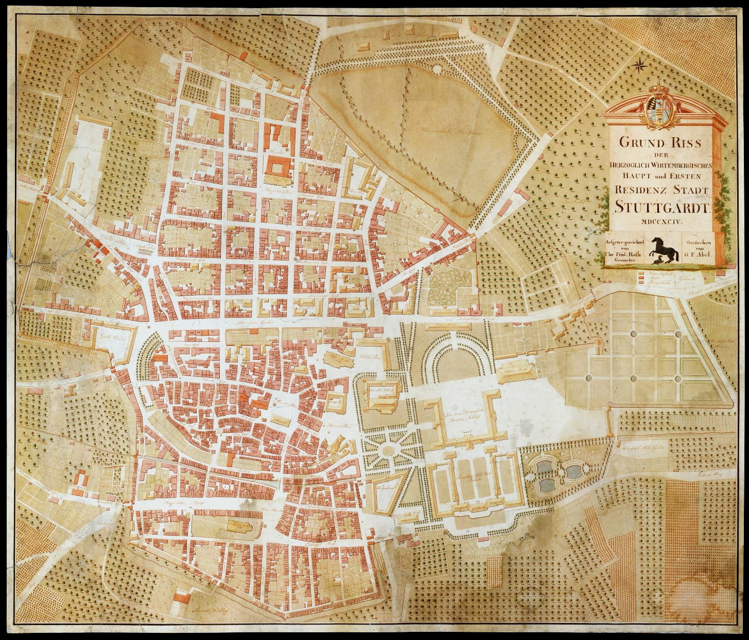 Grund Riss der Herzoglich Wirtembergischen Haupt und Ersten Residenz Stadt Stuttgardt, 1794, Maßstab ca. 1:2000